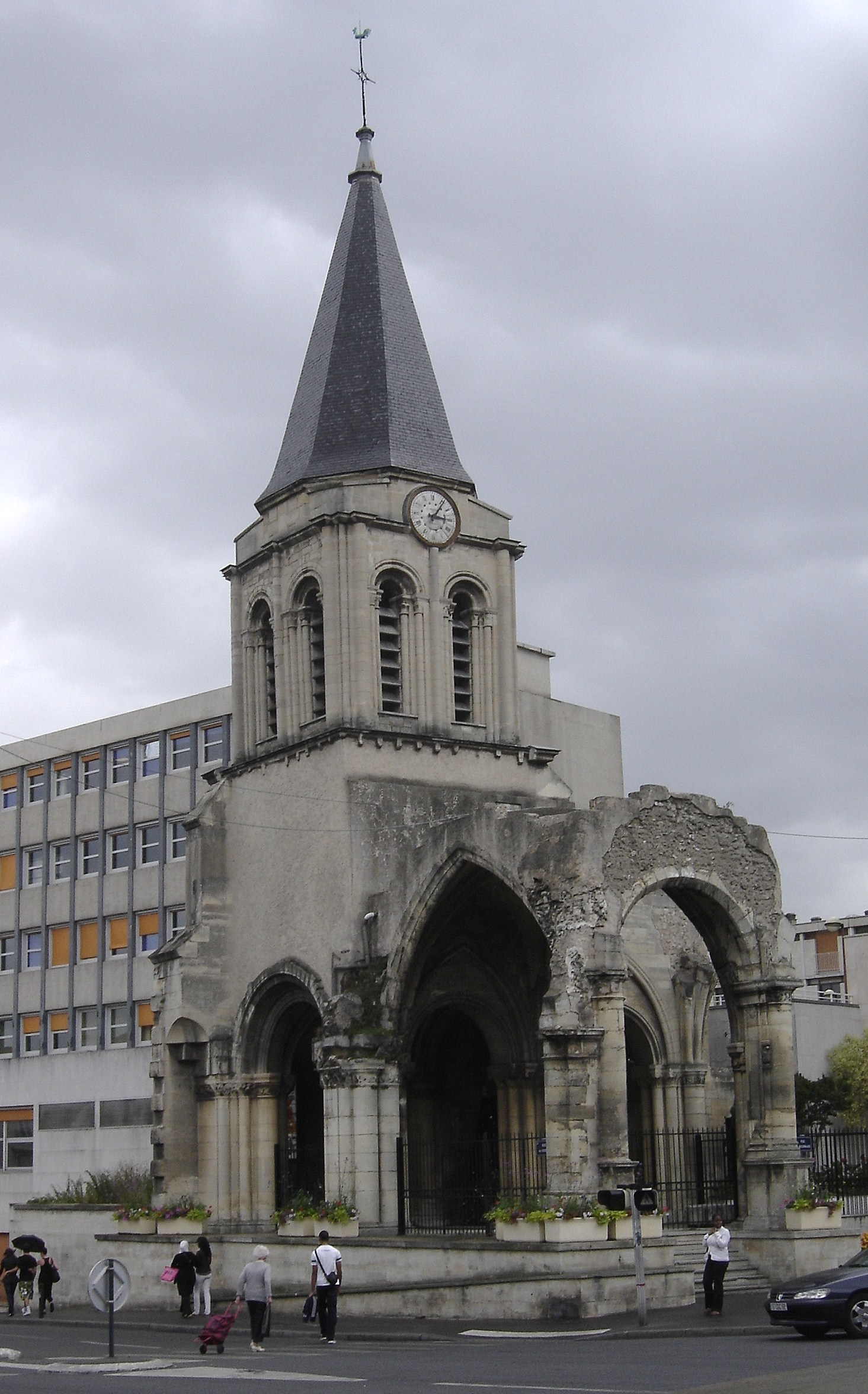 Ruine de l'ancienne église de Colombes (Hauts de Seine - France)